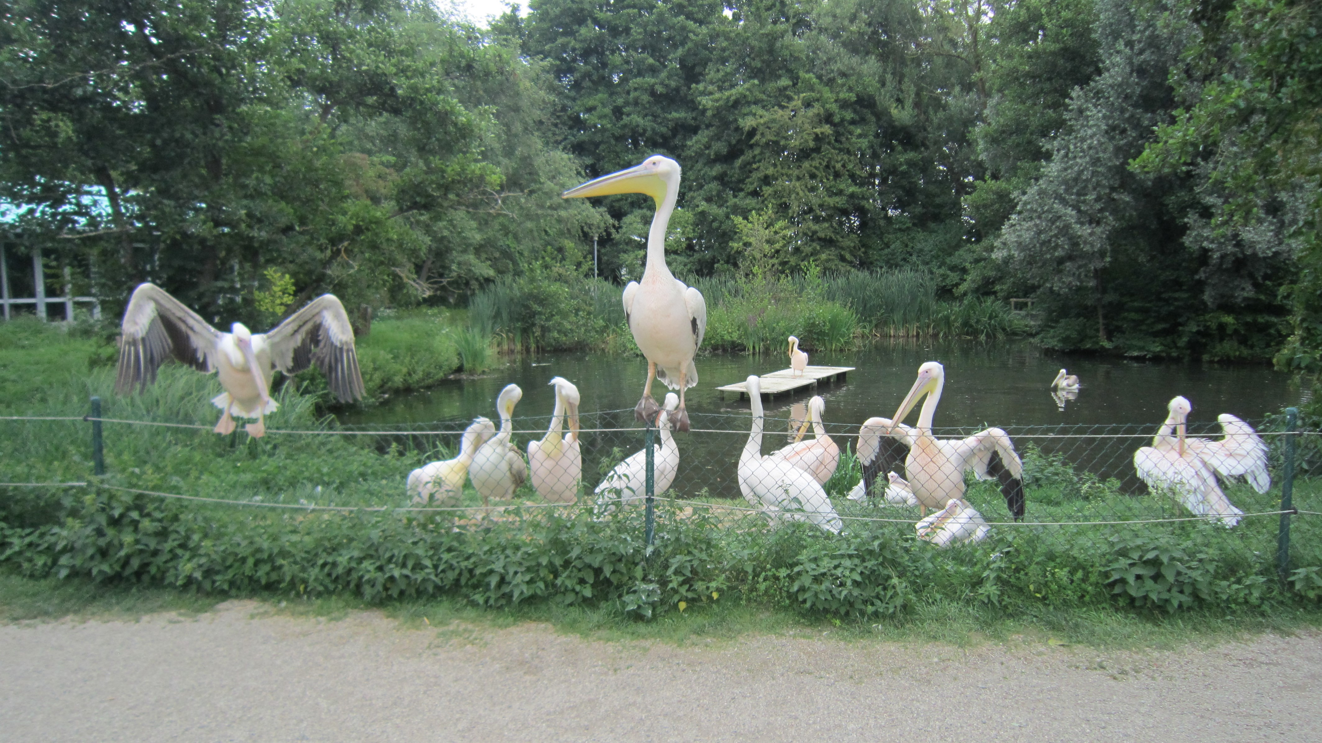 Pelikangruppe im Tiergarten Straubing (nach dem coronabedingten Ausbleiben von Zuschauern, im Juli 2020)